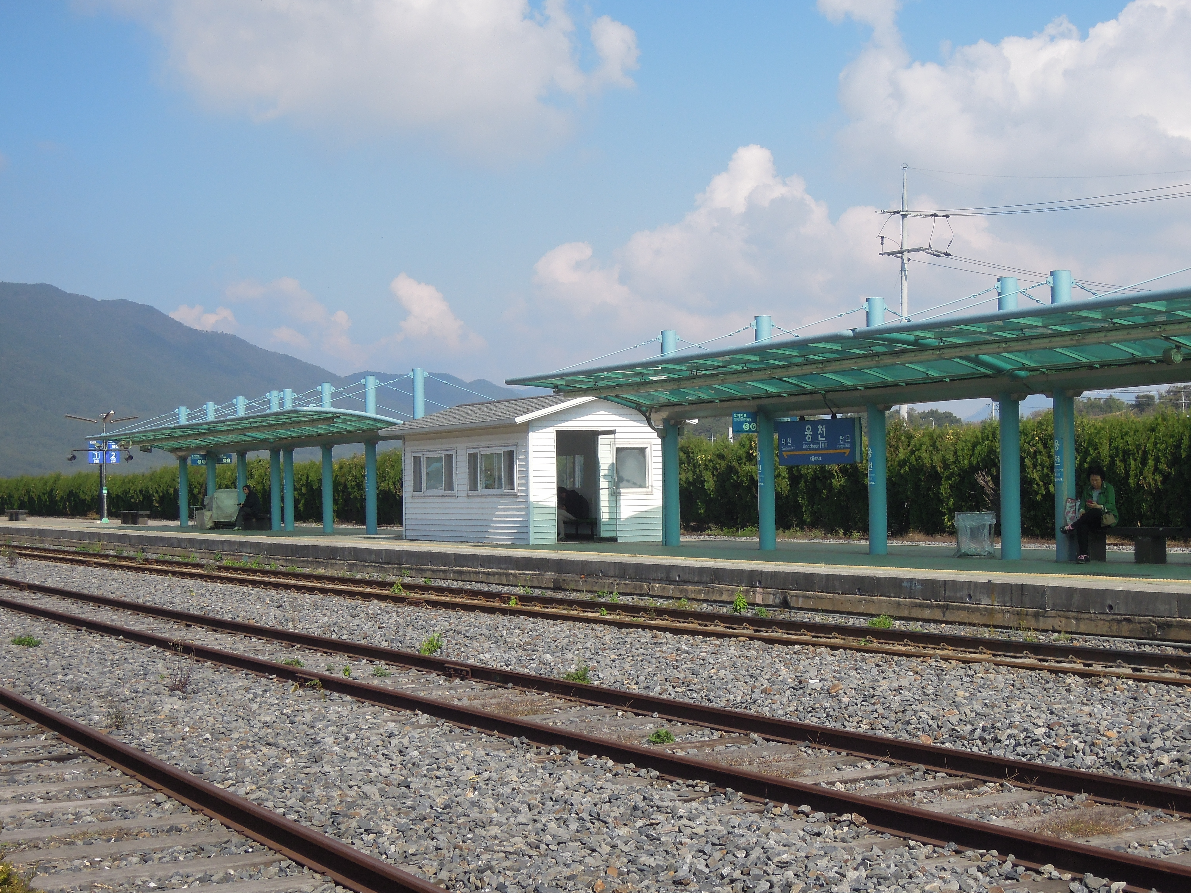 가을 여행에서 들렸던 어느 간이역